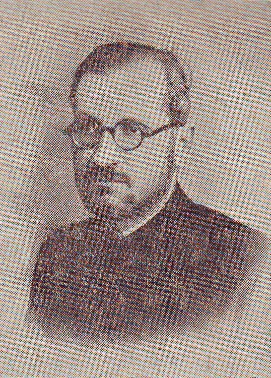 (n. 27 mai 1896, Humulești — d. 28 iunie 1941, Iași) a fost un învățător și preot ortodox român asasinat de huligani legionari, în timpul pogromului de la Iași.